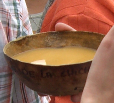 Vasija de Madera (Totuma) conteniendo Chicha de Maiz